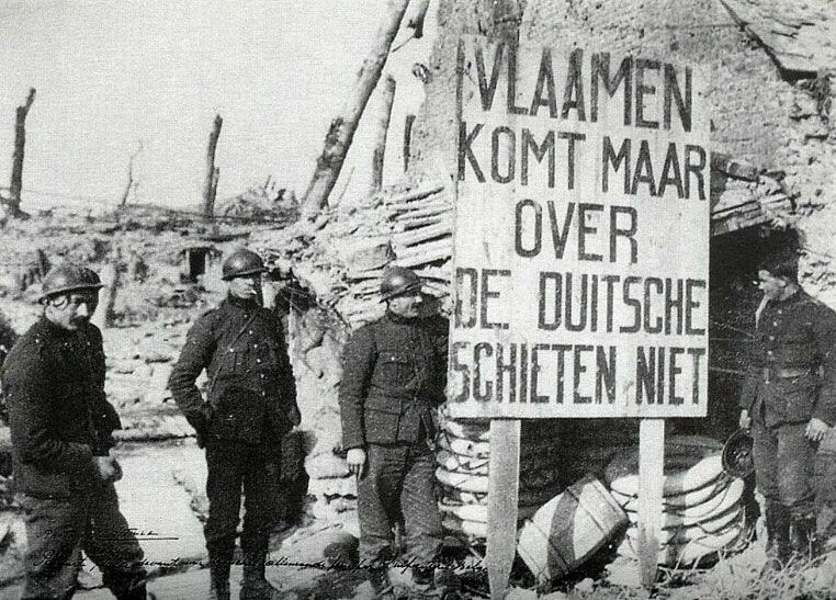 ‘Flamenpolitik’ (Vlamingenbeleid)